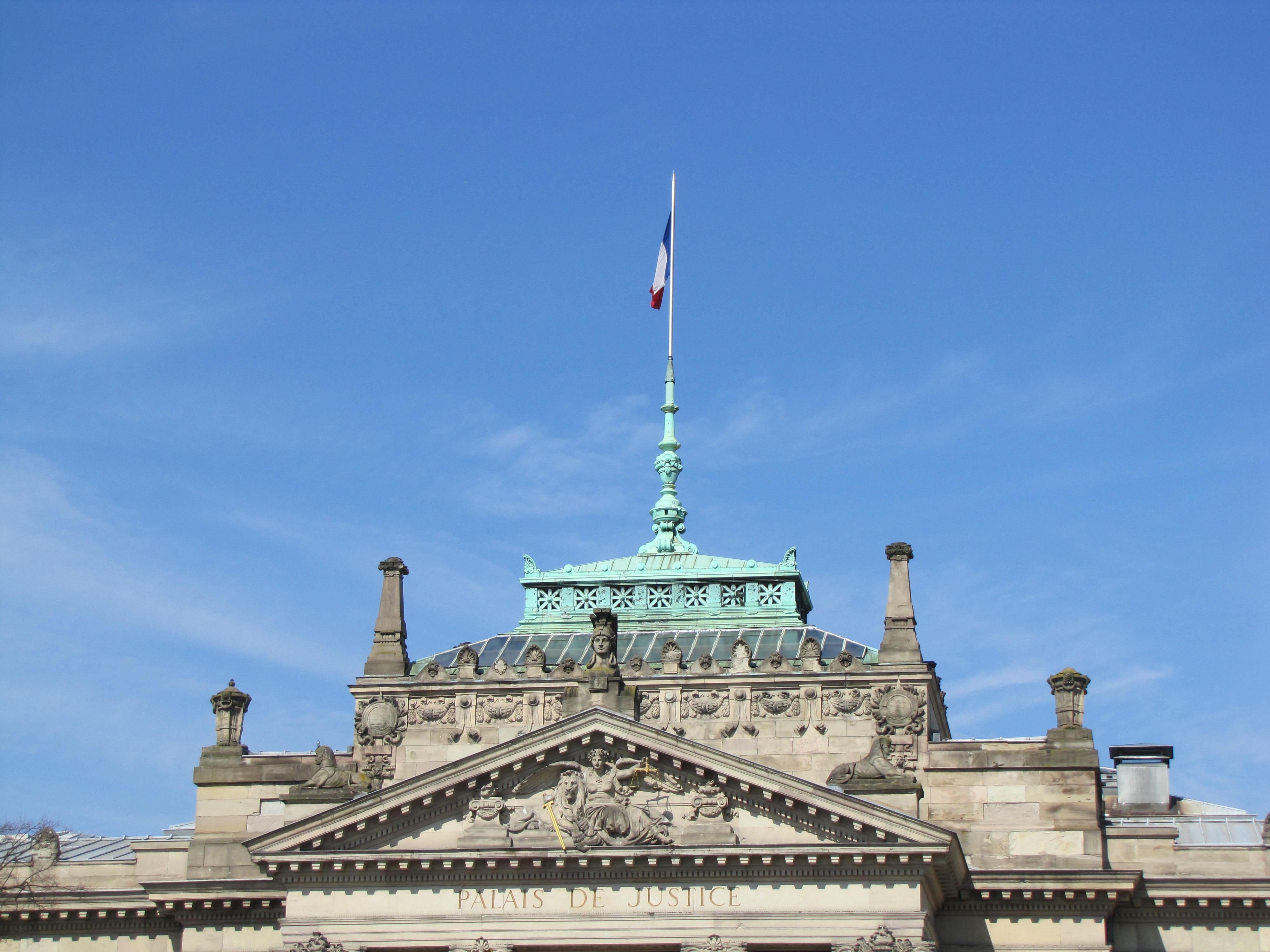 Alsace, Bas-Rhin, Strasbourg, Palais de Justice de Strasbourg (1897), quai Finkmatt. .